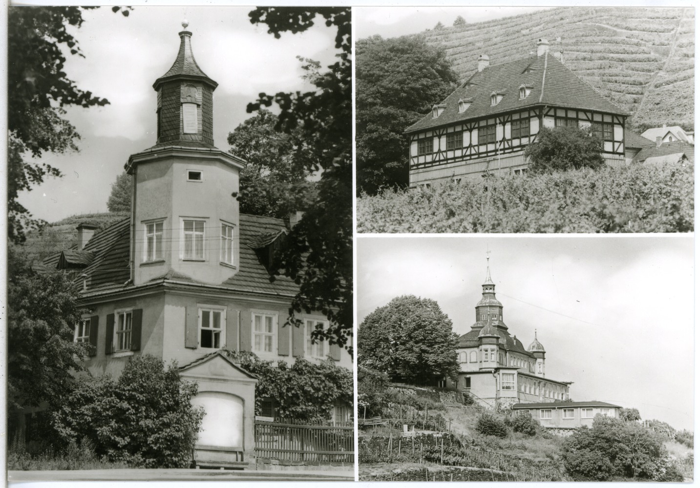 Radebeul; Turmhaus, Spitzhaus, Schloß Hoflößnitz This postcard is from publisher Brück & Sohn in Meißen ( postcard has a unique number 30200 and is available in a higher resolution at the publisher. This images was uploaded in a cooperation project between Wikipedians and the publisher.